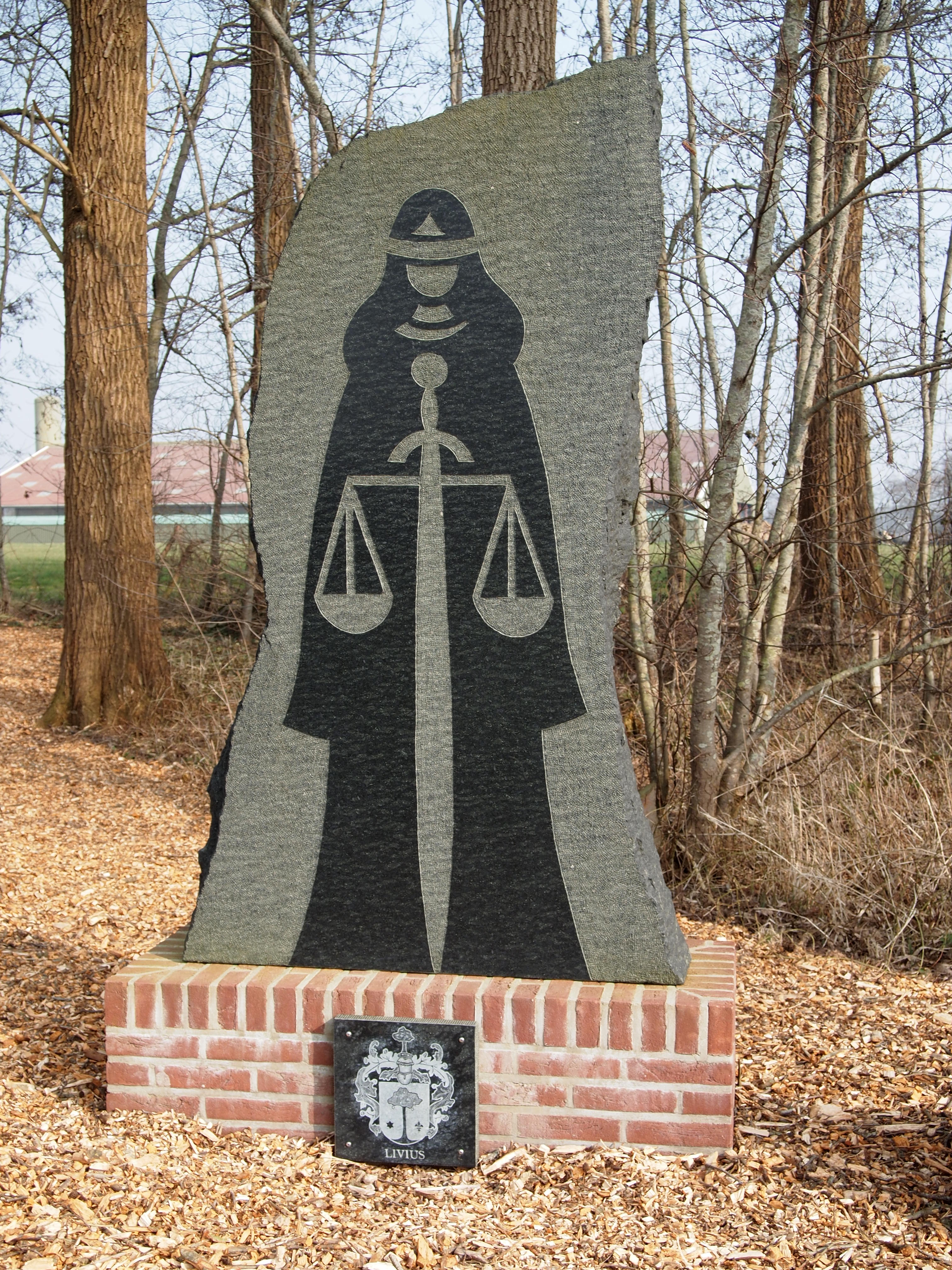 De volgende informatie staat op een plaquette naast het beeld. VROUWE JUSTITIA. Het door Anne Woudwijk gemaakte monument, toont ons het beeld van vrouwe justitia met blinddoek, weegschaal en zwaard. Het bevind zich op het voormalig grondgebied van groot Haersma stata. "De iepenloftspullen" Livius en Hector van Haersma vormden de aanleiding tot het ontwerpen en vervaardigen van dit als aandenken bedoelde monument. Vanaf 1625 to 1832 heeft de familie van Haersma te Oudega, de toenmalige hoofdplaats van Smallingerland, het grietmanschap uitgeoefend. De familie woonde oorspronkelijk op klein Haersma-state aan de Sanbuorren. Aan de huidige dwarssingel lieten ze in 1660 groot Haersma-state bouwen. Deze residentie is in 1839 weer afgebroken.